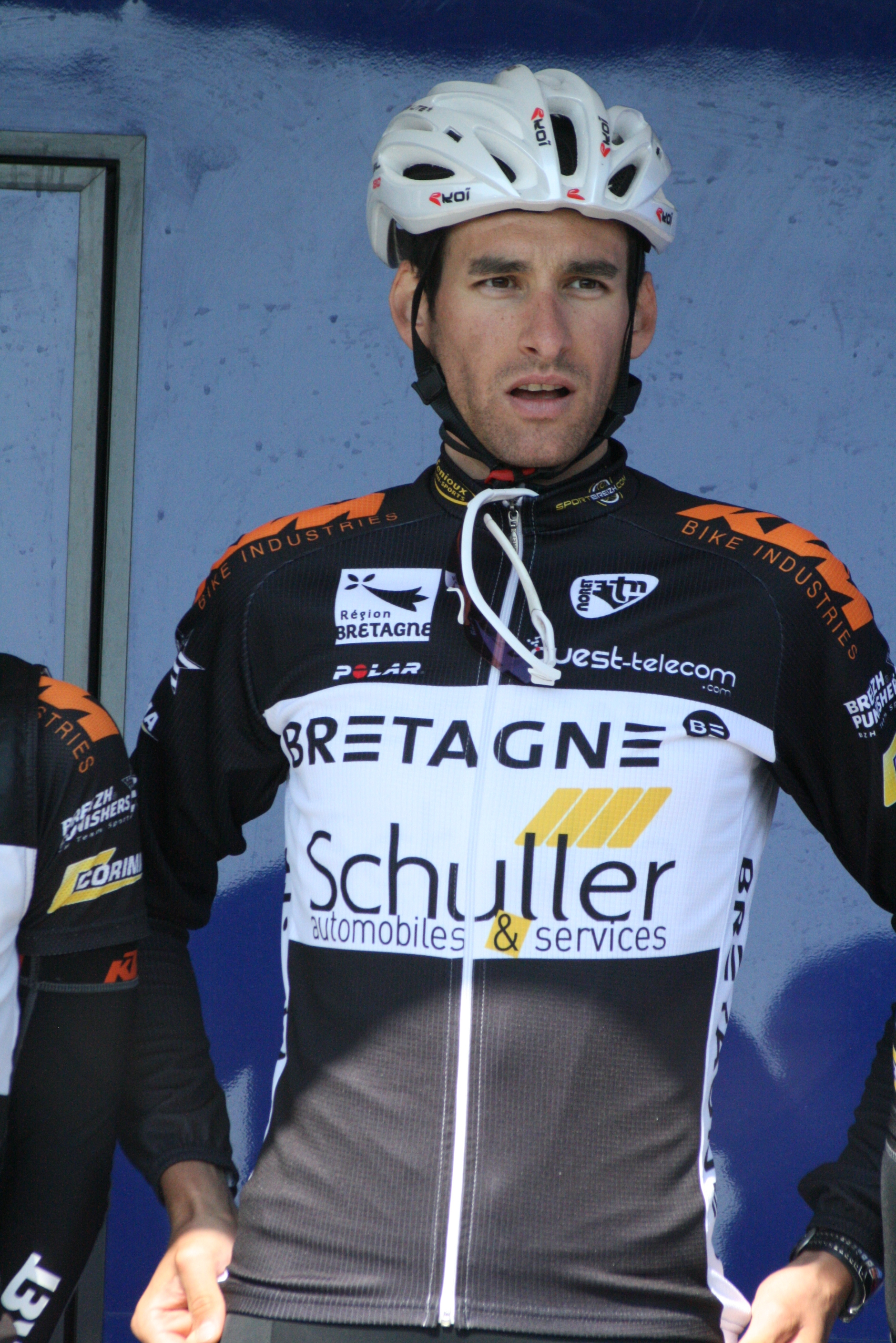 Présentation des coureurs au départ de la première étape Florian Guillou